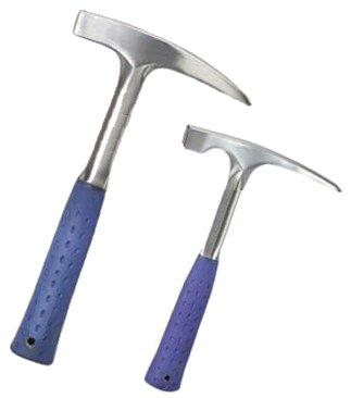 Geologenhammer